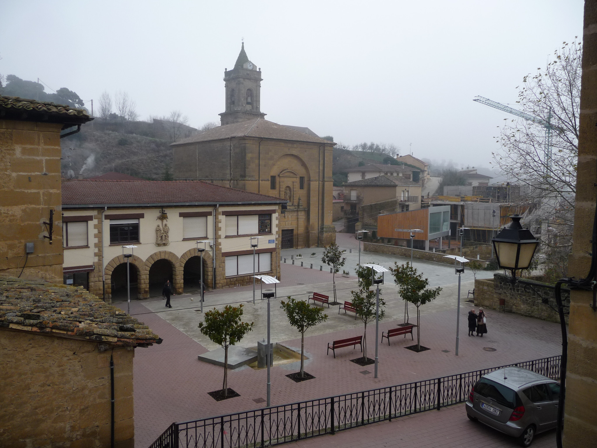 Iglesia de San Andrés - Villabuena de Álava.